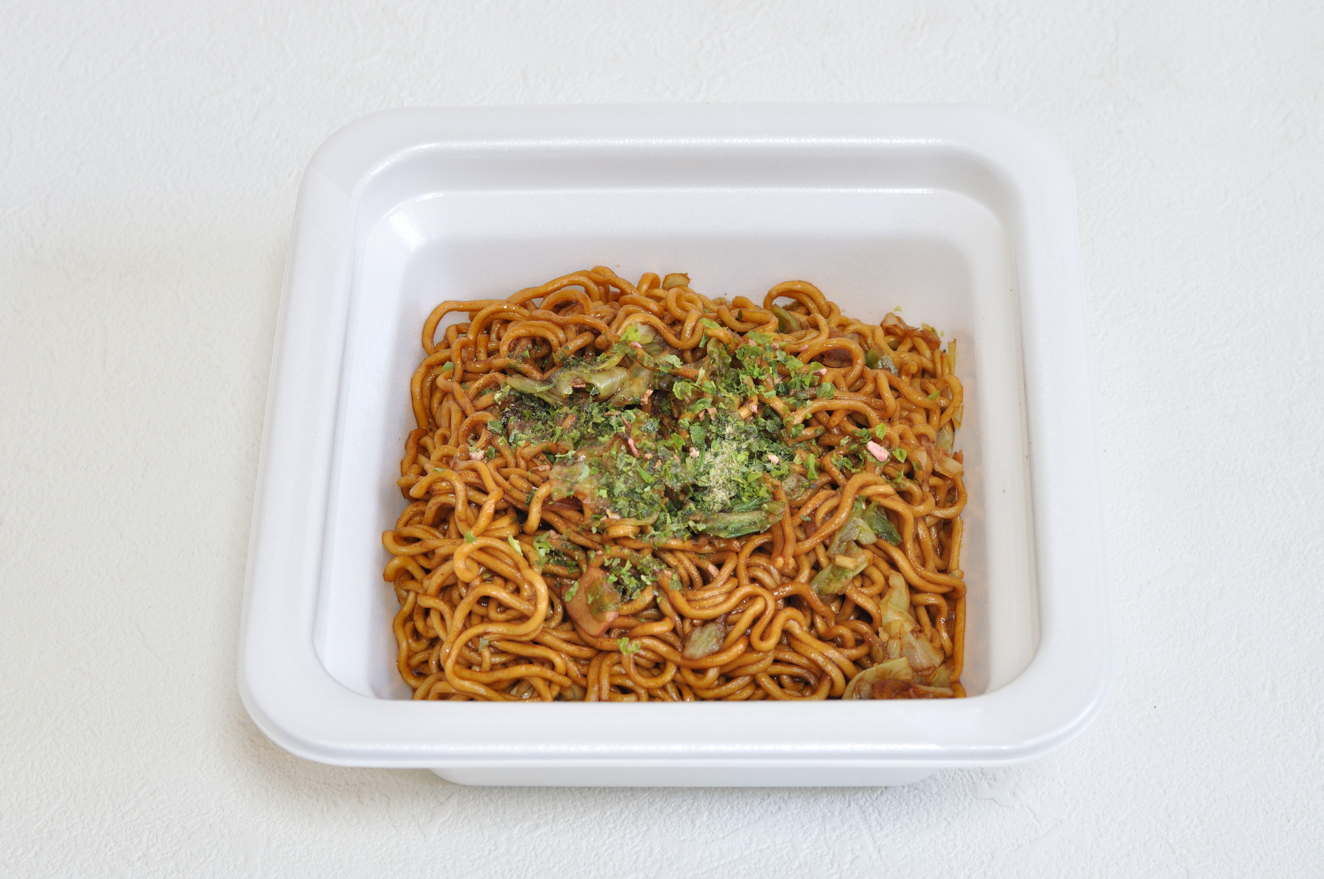 エースコックのスーパーカップ 大盛りいか焼そば